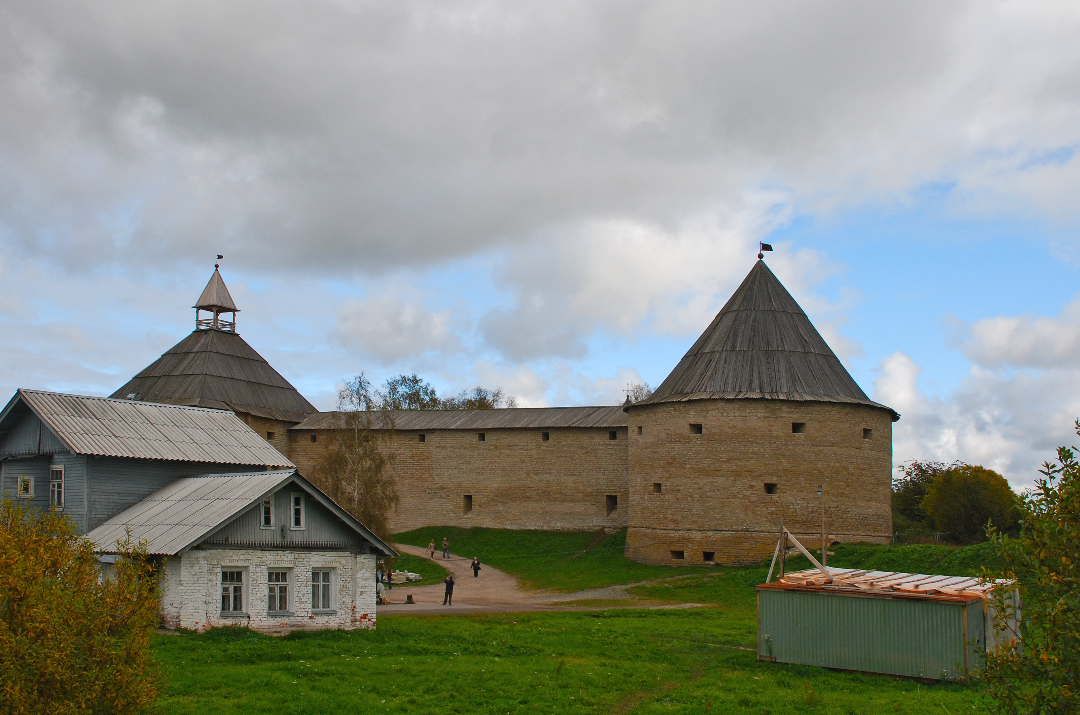 Крепость "Старая Ладога" (Санкт-Петербург и Лен.область, Новая Ладога, Старая Ладога)